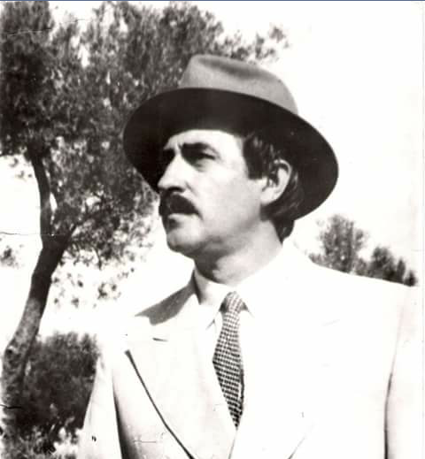 Foto Shpetim Shemili